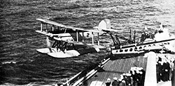 Start eines Fairey IIIF-Bordflugzeuges von der chilenischen Almirante Latorre